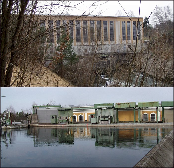 Kraftwerk Traunleiten - Gemeinde Steinhaus